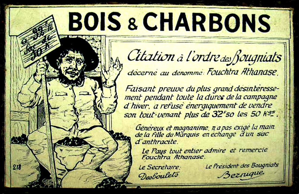 Bougnat bois et charbon